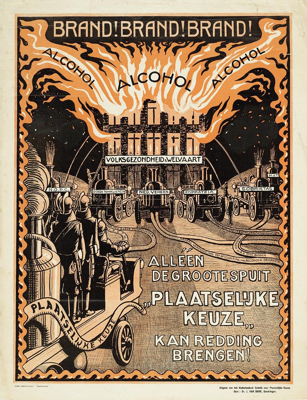 Affiche. "Drankbestrijding: Nederlandsch Comité voor Plaatselijke Keuze".